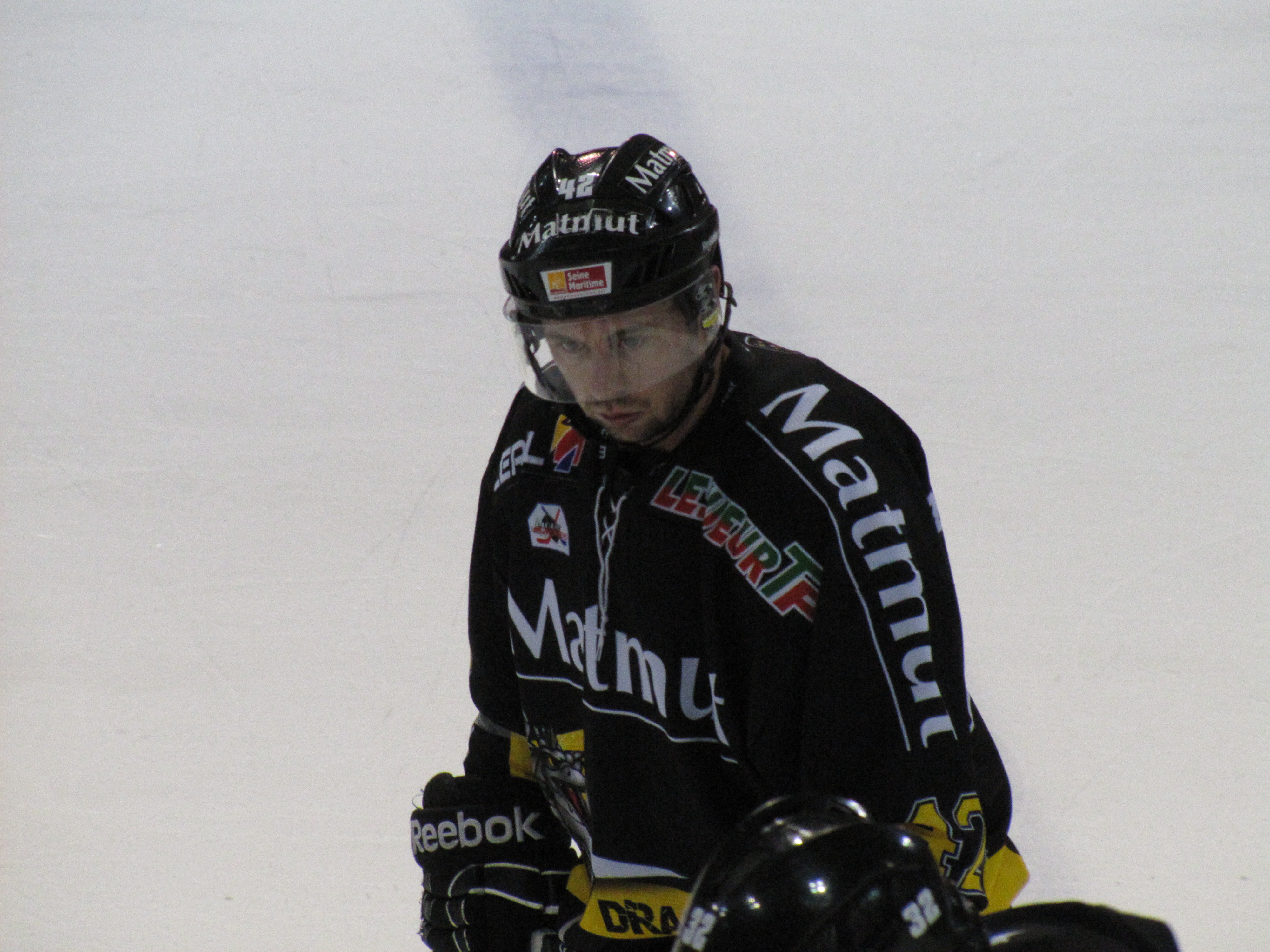 Julien Desrosiers lors de la Coupe Continentale de hockey 2012 à Rouen